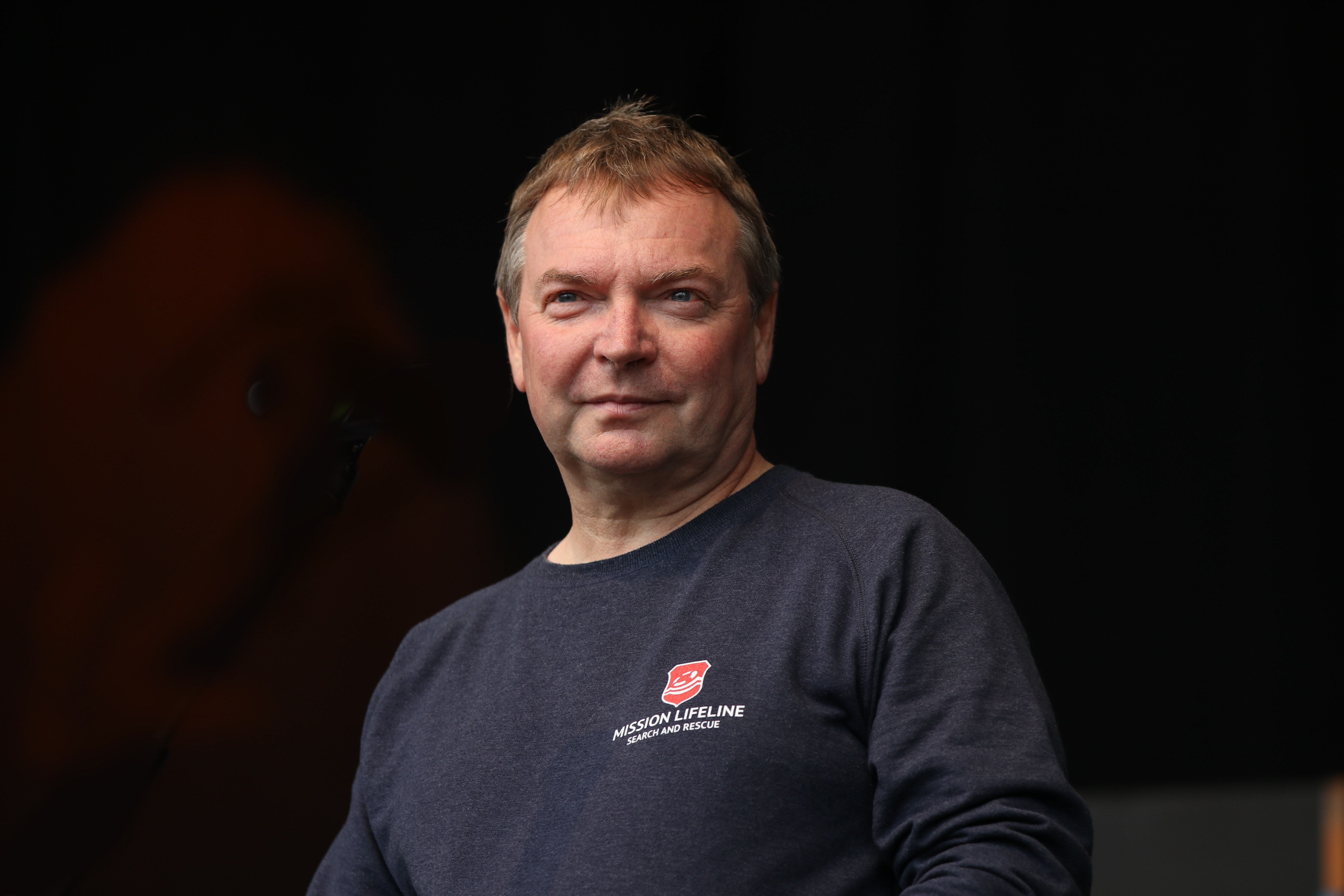 Ausgehetzt, Demonstration in München am 22. Juli 2018 gegen den Rechtsruck in der bayerischen Politik